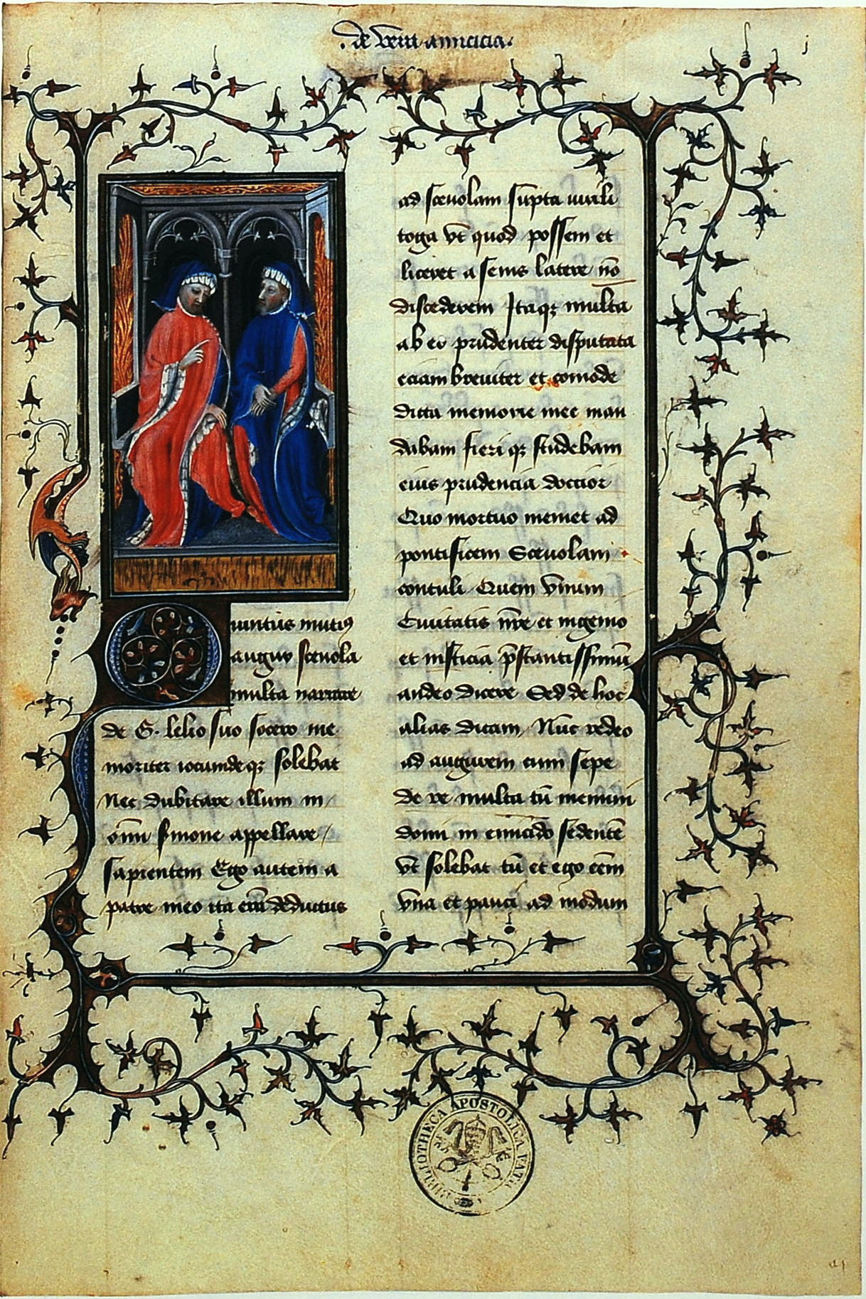 Marcus Tullius Cicero: De amicitia. Handschrift, Pergament 30,5 x 20,5 cm. Bibliothek Ulrich Fugger → Bibliotheca palatina Heidelberg → Vatikanische Bibliothek.